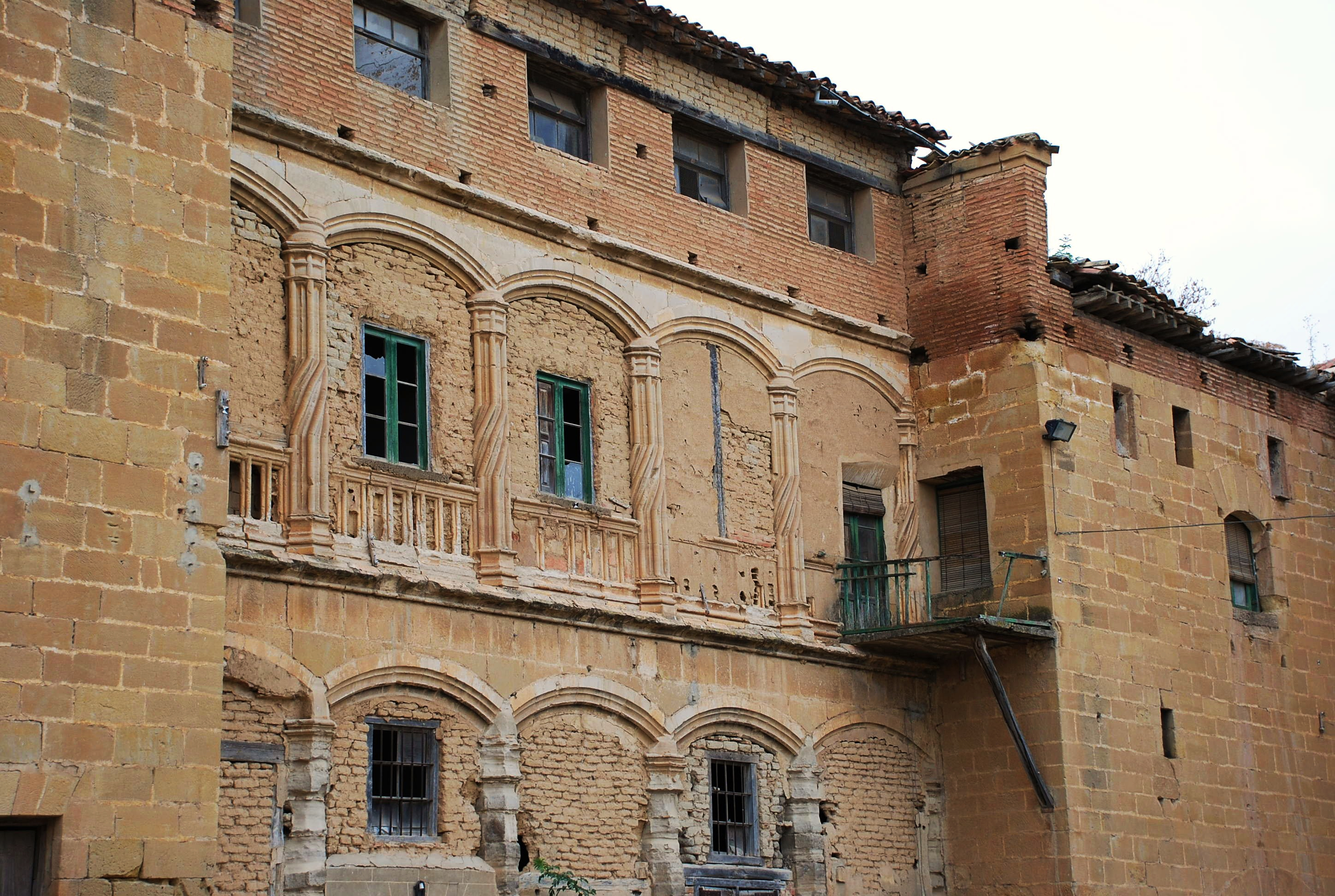 Palacio de los Condestables de Castilla en Casalarreina, La Rioja (España)